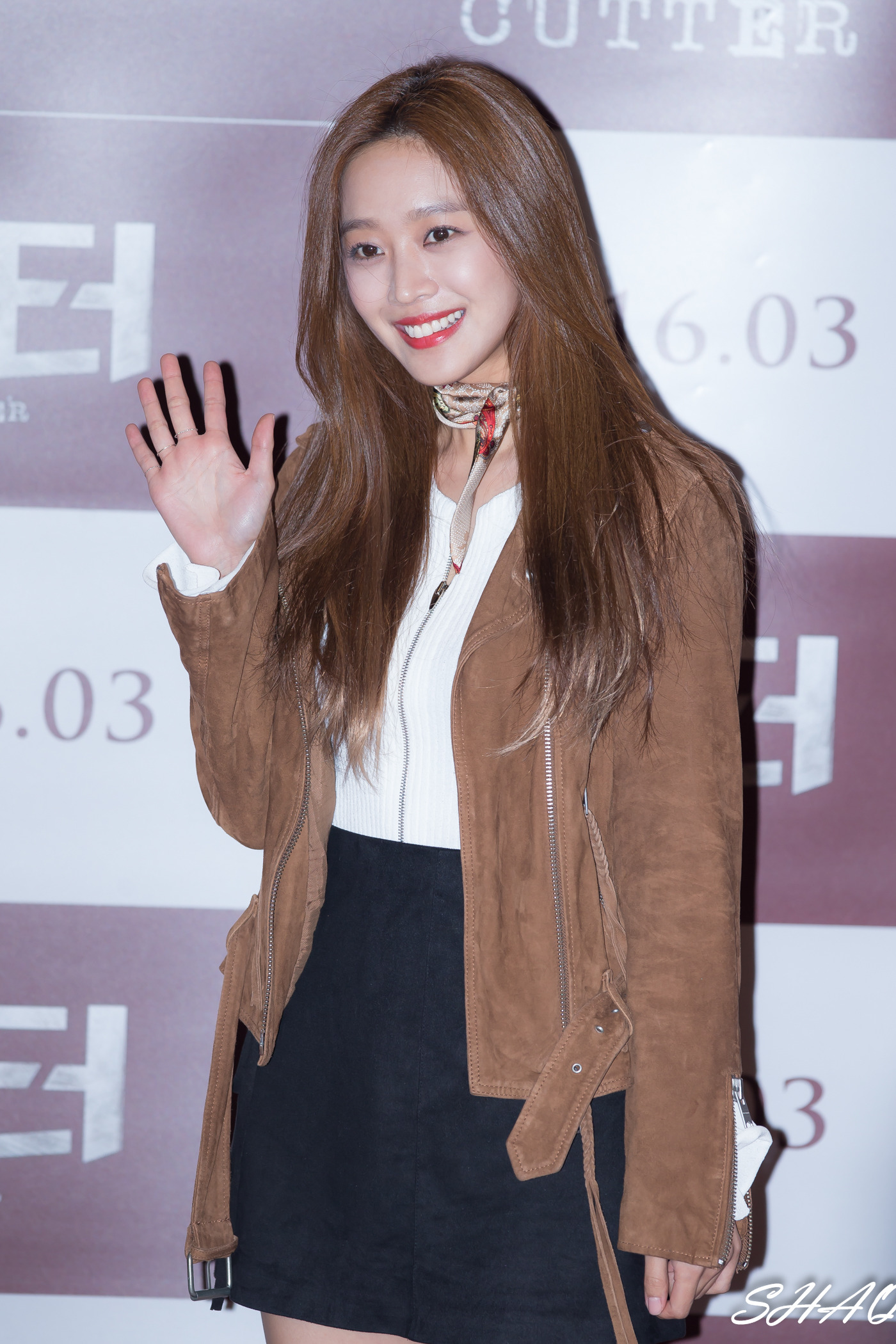 160329 영화 커터 VIP 시사회 - 조보아